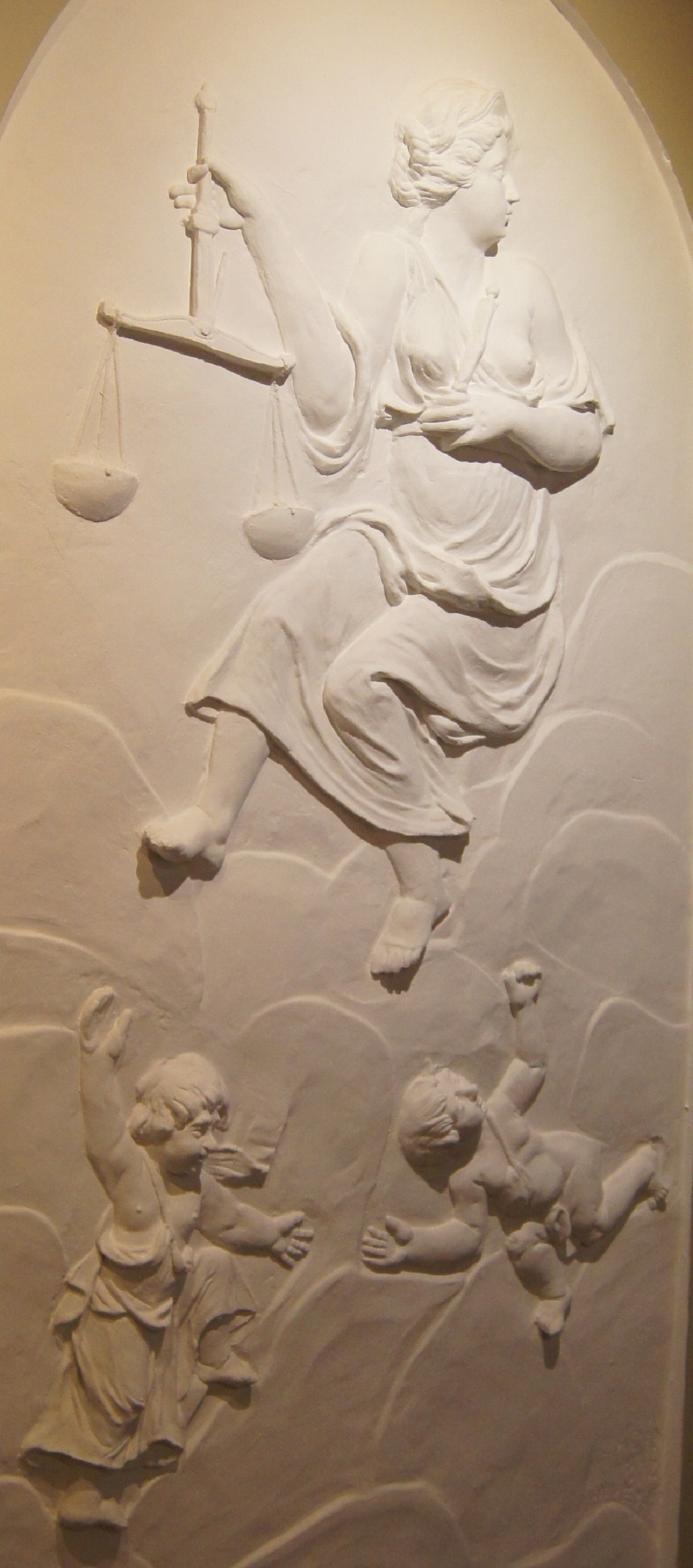 Stadtmuseum Eupen, Stuckrelief, Justitia von Petrus Nicolaas Gagini, Abguss